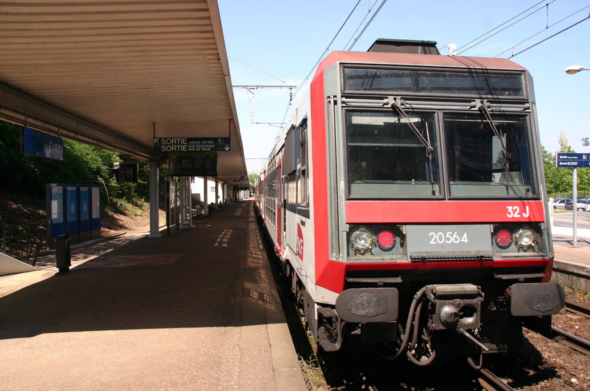 La Gare d'Évry , Évry, département de l'Essonne, France